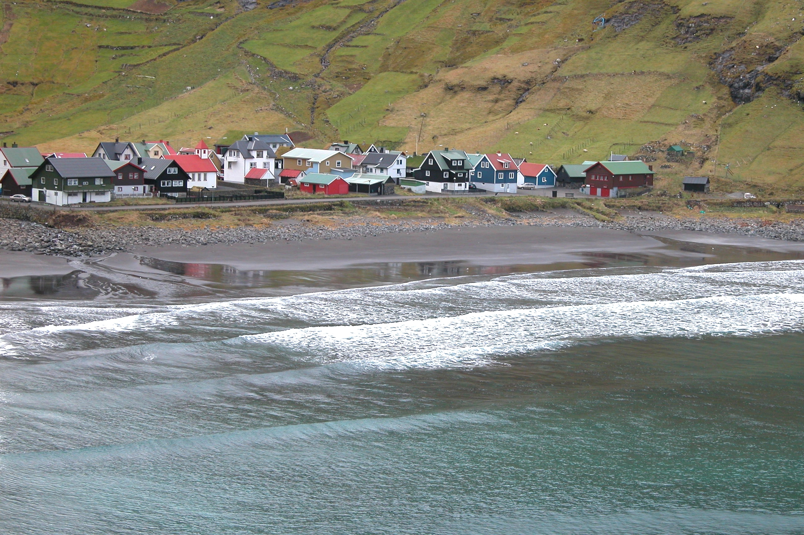 Tjørnuvík on Streymoy, Faroe Islands